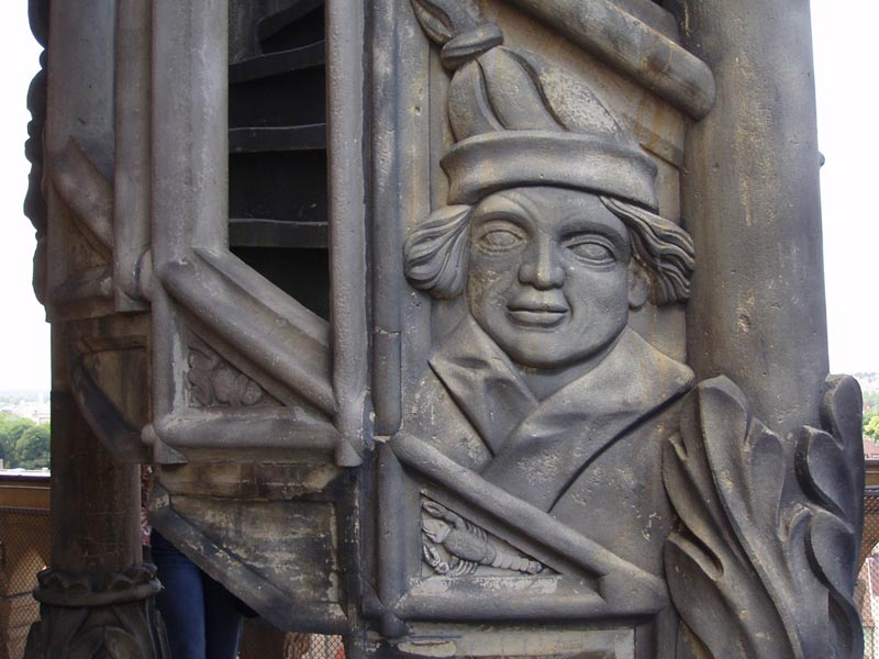 Bildnis an einer Wendeltreppe aus Stein auf halber Höhe des Turms der Kilianskirche in Heilbronn. Das nach dem zweiten Weltkrieg rekonstruierte Bildnis könnte eventuell den Baumeister Hans Schweiner zeigen.